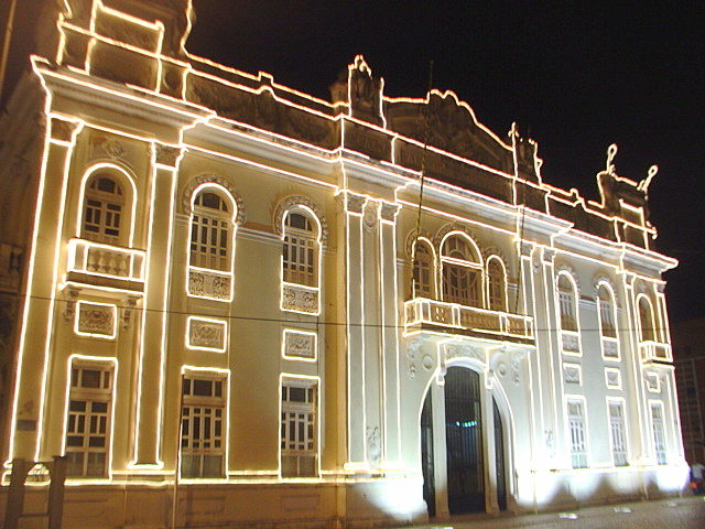 Prédio antigo do Centro de Aracaju, ornamentado para o Natal.